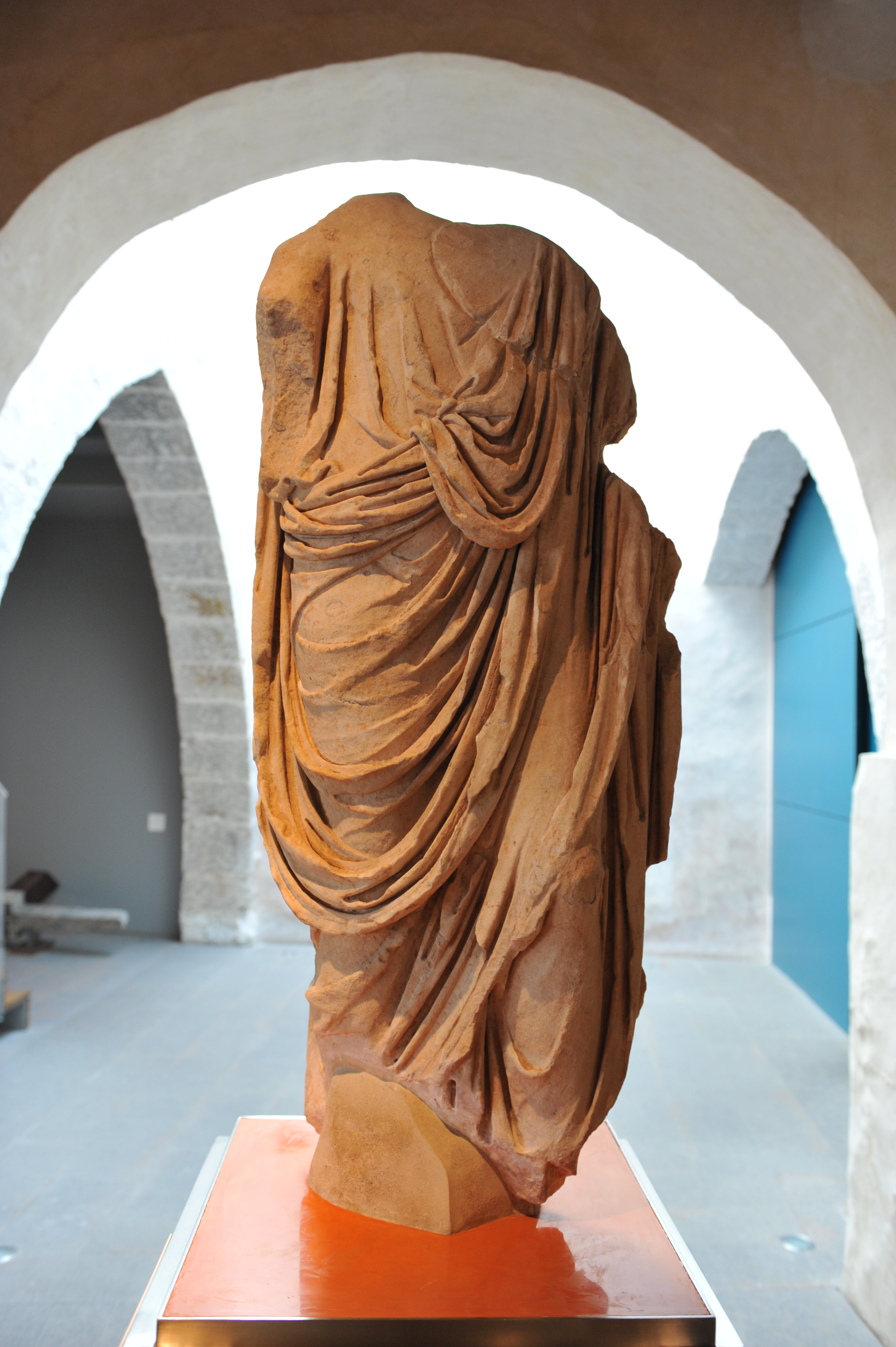 Fragment d'escultura de personatge togat amb bulla. Segle I dC. Època julioclàudia. Porta de mahoma. Castell de Sagunt. Museu Arqueòlogic de Sagunt. S. 16.20.